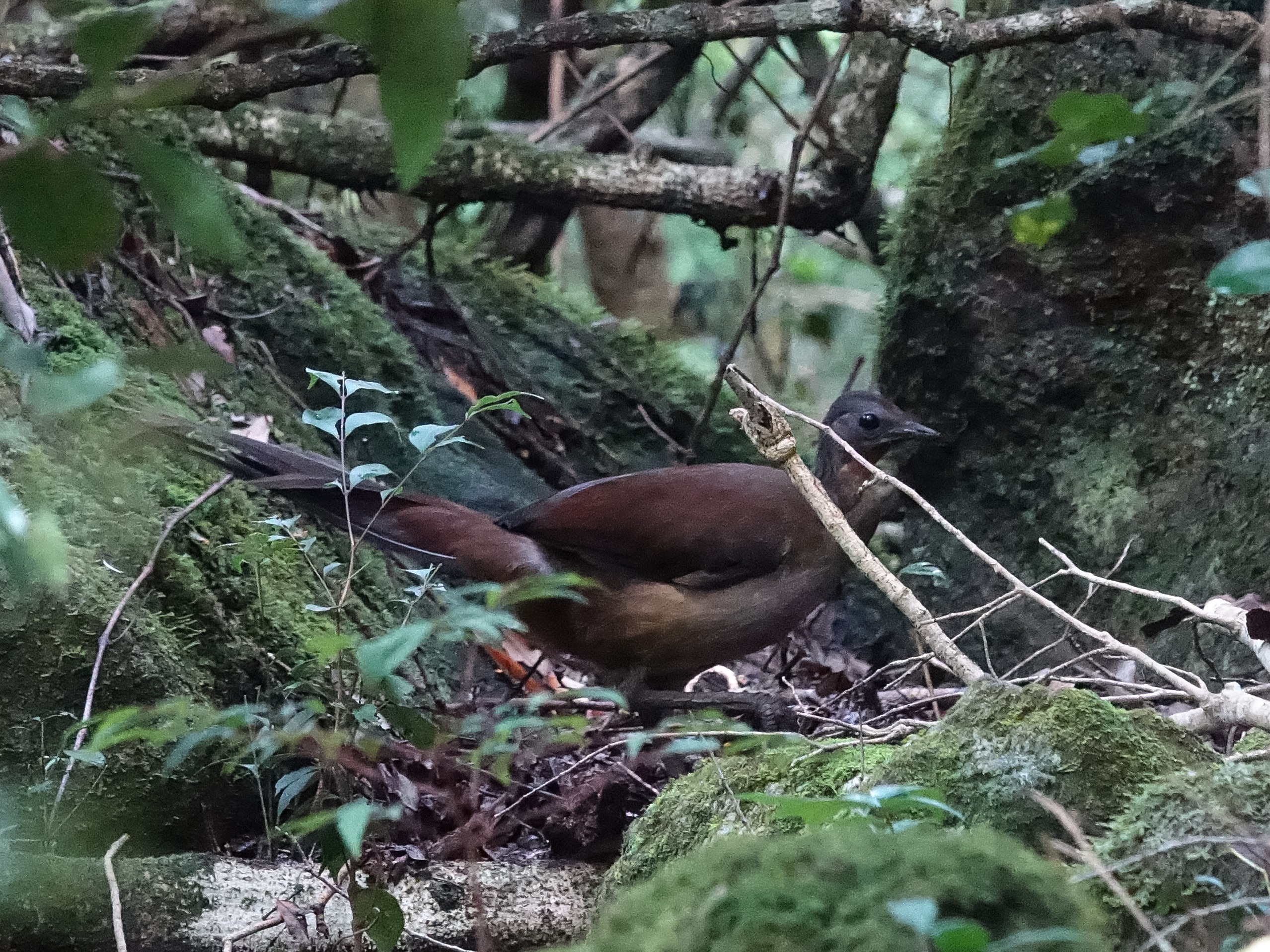 Albert's Lyrebird